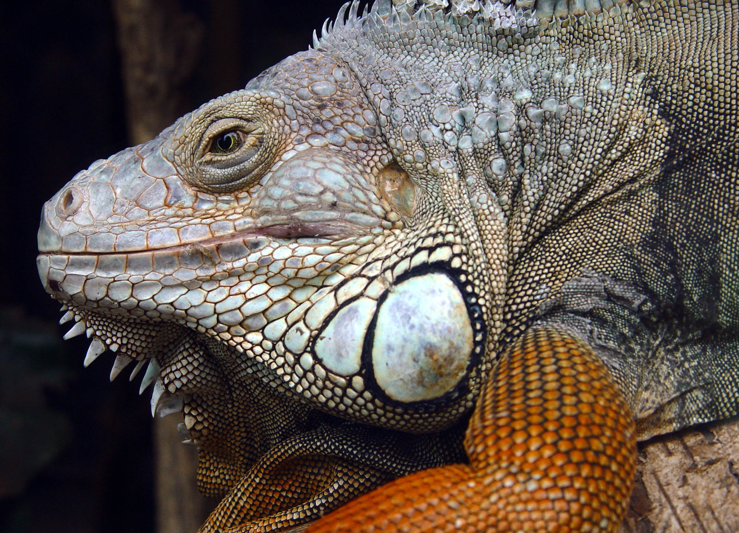 Beschreibung: Leguan (Iguana Iguana) Aufnahmedatum: Fotografiert am 19. Mai 2002 Fotograf: ArtMechanic